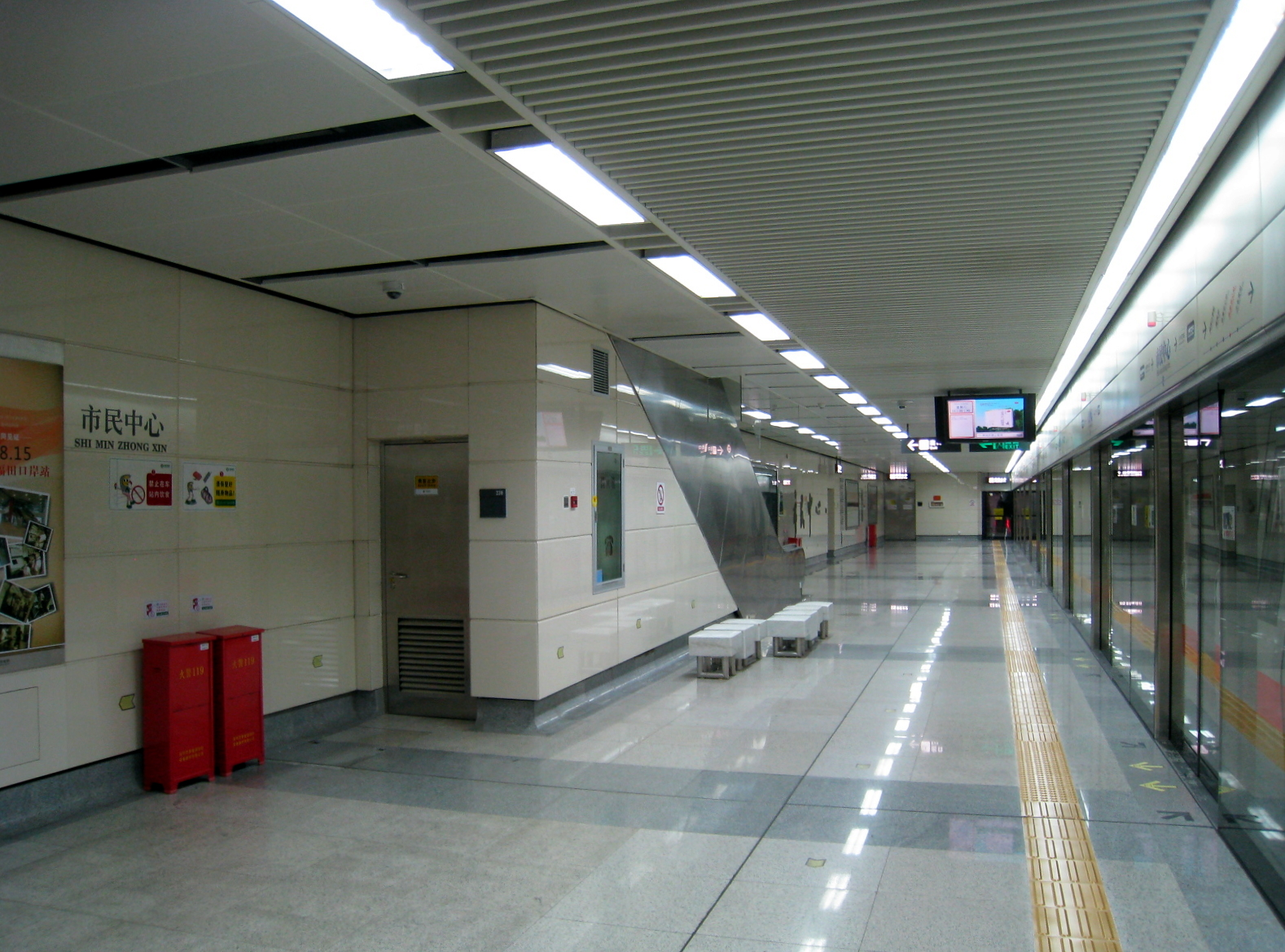 ShenZhen Metro Shi Min Zhong Xin Platform 市民中心站 (深圳)